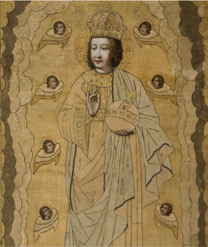 Икона «Спас Эммануил» Москва. Оружейная палата, 1680-е гг. Небесные Силы и держава в руках напоминают западную иконографию Спасителя Мира, однако изображение Эммануила, юного Христа, не характерное для Запада, встречается лишь в византийской традиции и обозначает евхаристического (в данном случае) и апокалипсического Агнца, который являлся символом последнего времени. Обращает на себя внимание портретное сходство между образом Спаса Эммануила и парсуной Федора Алесксеевича. Уникальную технику, в которой выполнено произведение, называемую обычно аппликацией на деревянную основу, можно отнести к декупажу (фр. decouper – вырезать). Эта декоративная техника заключается в скрупулезном вырезании изображений из различных материалов (дерева, кожи, тканей, бумаги и т. п.), которые затем наклеиваются или прикрепляются иным способом на различные поверхности для декорирования. В России такая техника до XVII века не была известна, ее привезли в Оружейную палату западные художники.